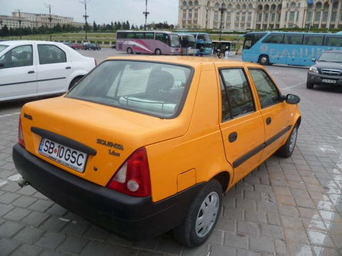 Dacia Solenza photographiée à Bucarest.